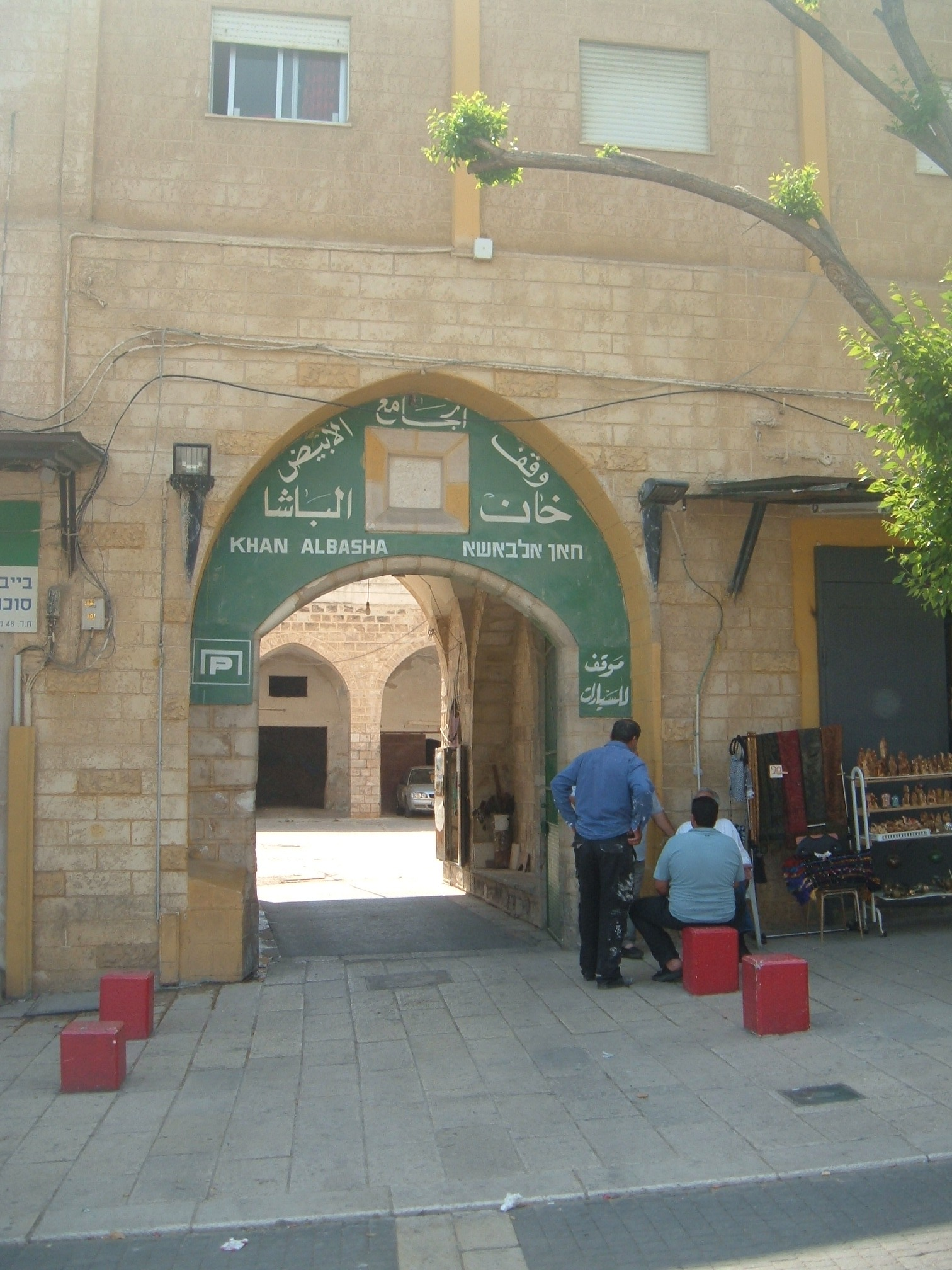 Han El Basha, Nazareth הכניסה לחאן אל באשה, נצרת